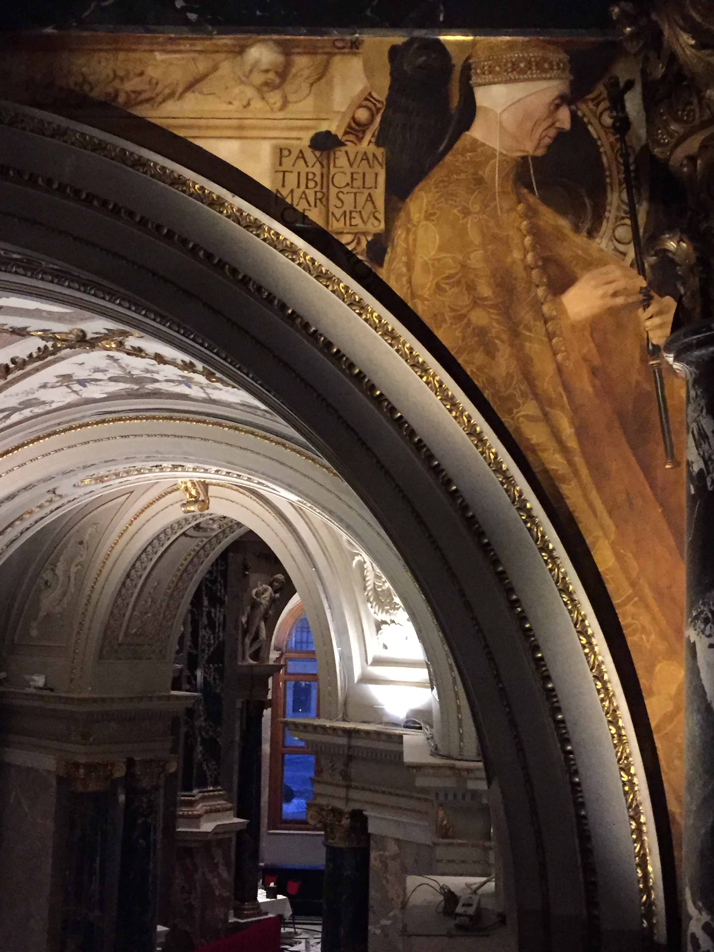 Zwickelbild